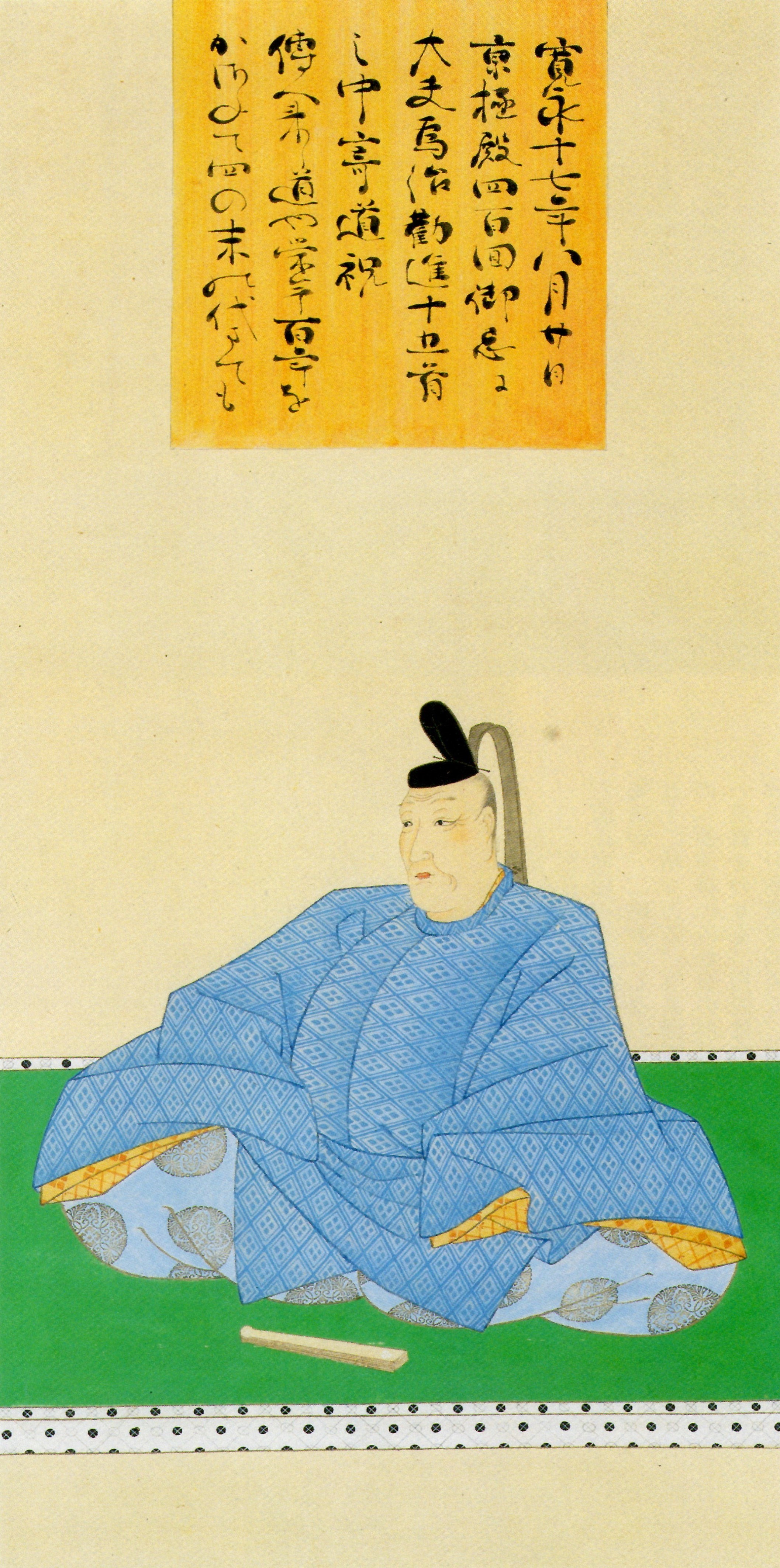 藤谷為賢の肖像。